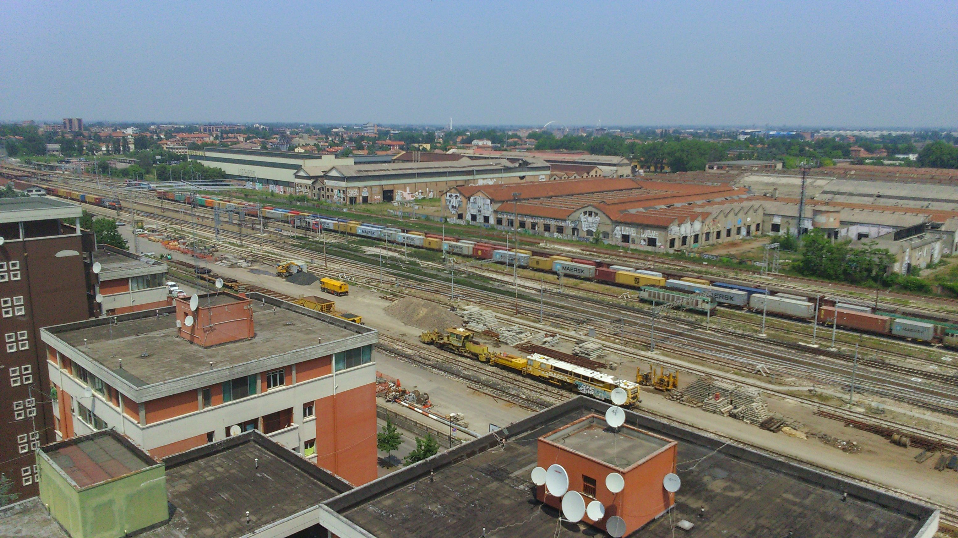 Veduta dello scalo ferroviario della stazione centrale di Reggio Emilia da via Turri